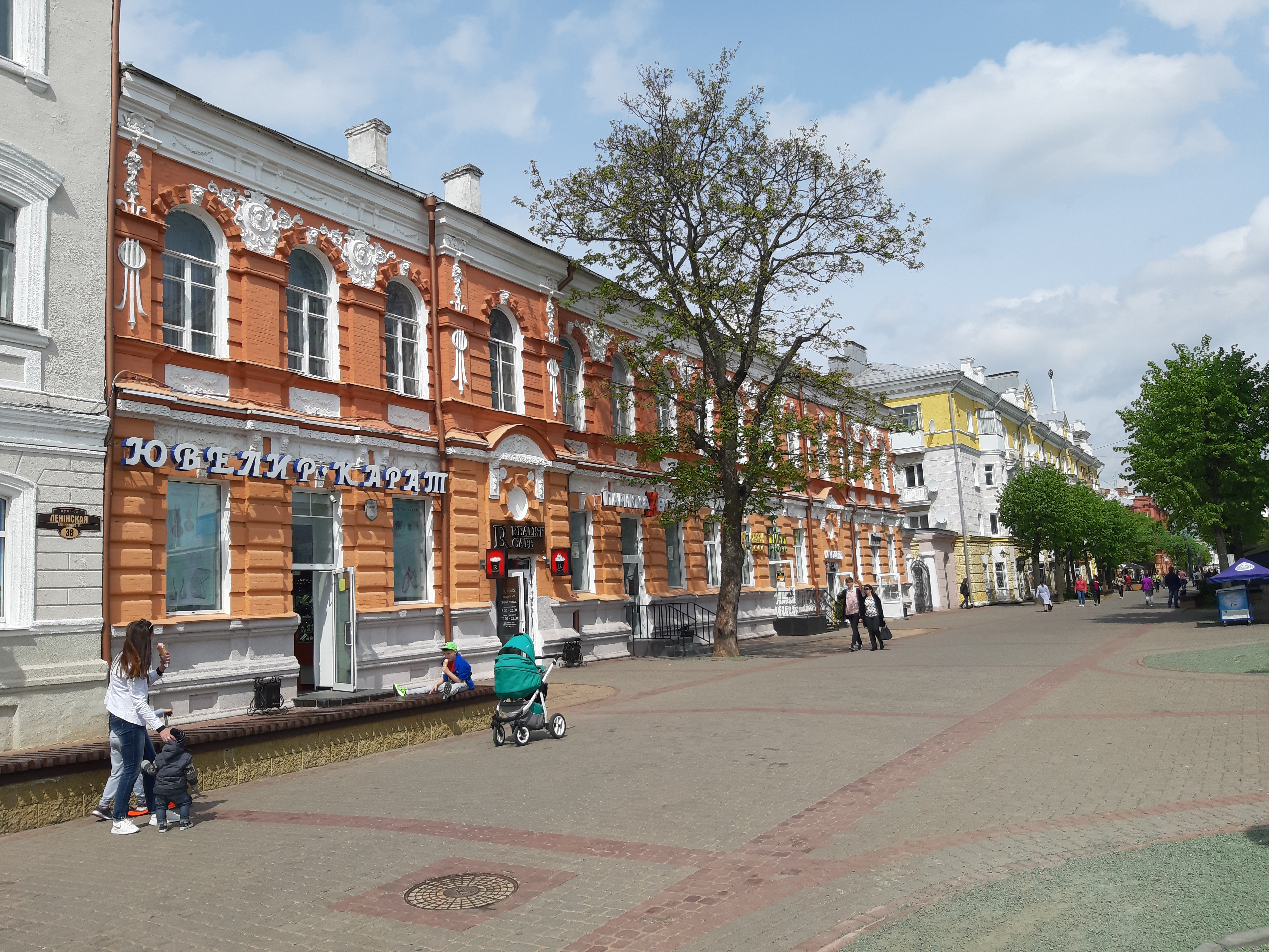 Магілёў. Па Ленінскай